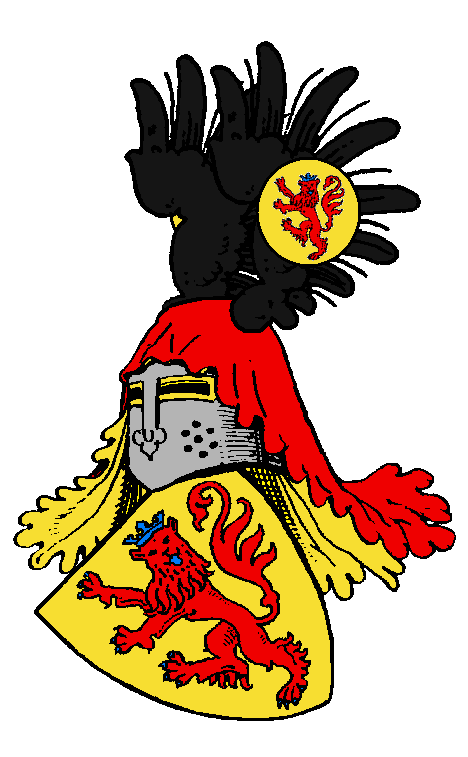 Stammwappen der Grafen von Katzenelnbogen.